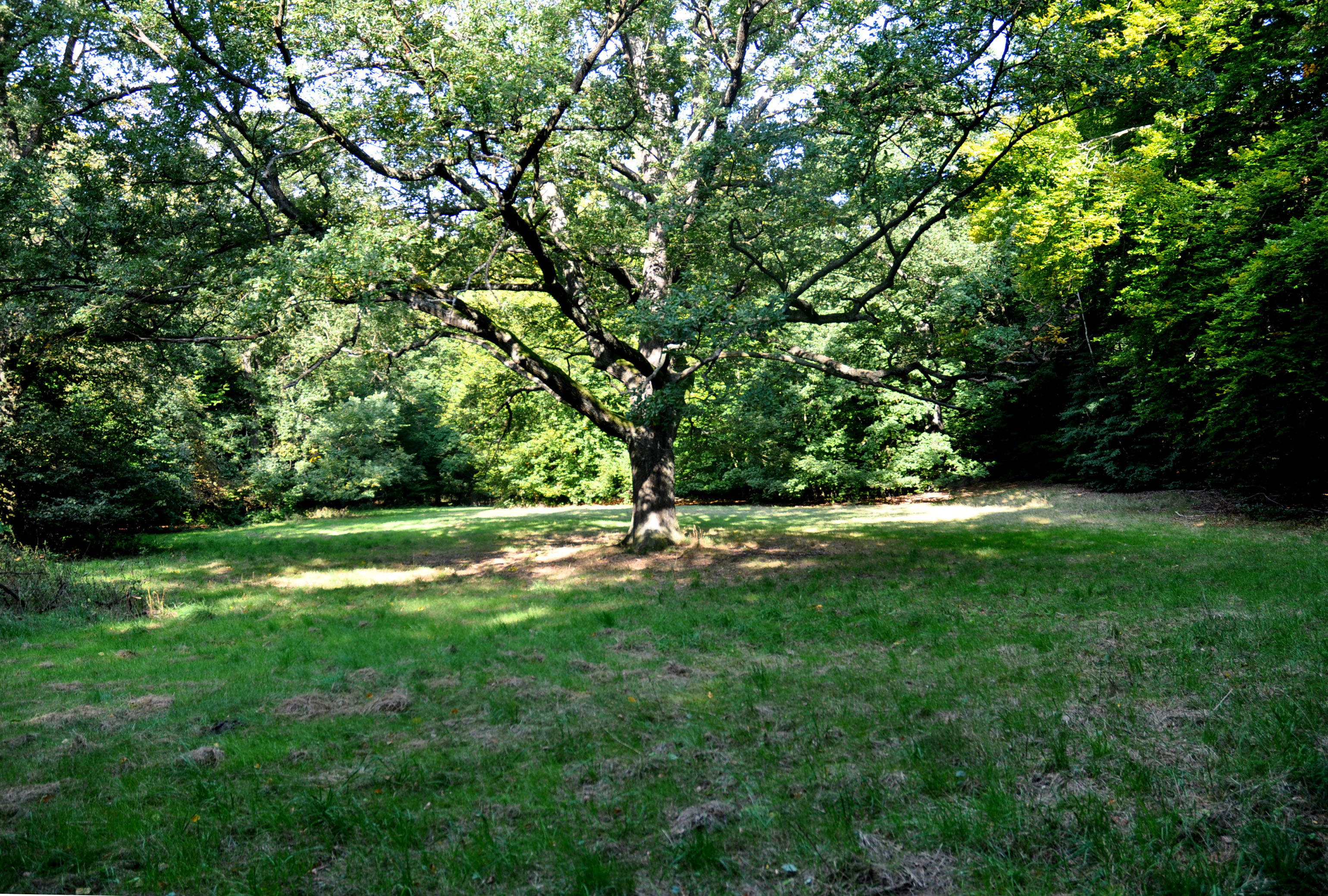 Kleiner Parkraum mit Solitärbaum südl. Wildparktor, Parkraum stark verkleinert, der Solitärbaum mangels Raum verkahlt